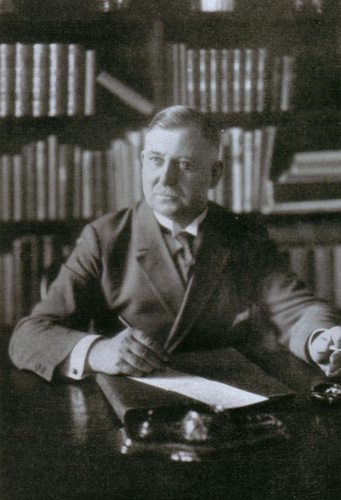 Fotografie von August Winnig als Oberpräsident der Provinz Ostpreußen